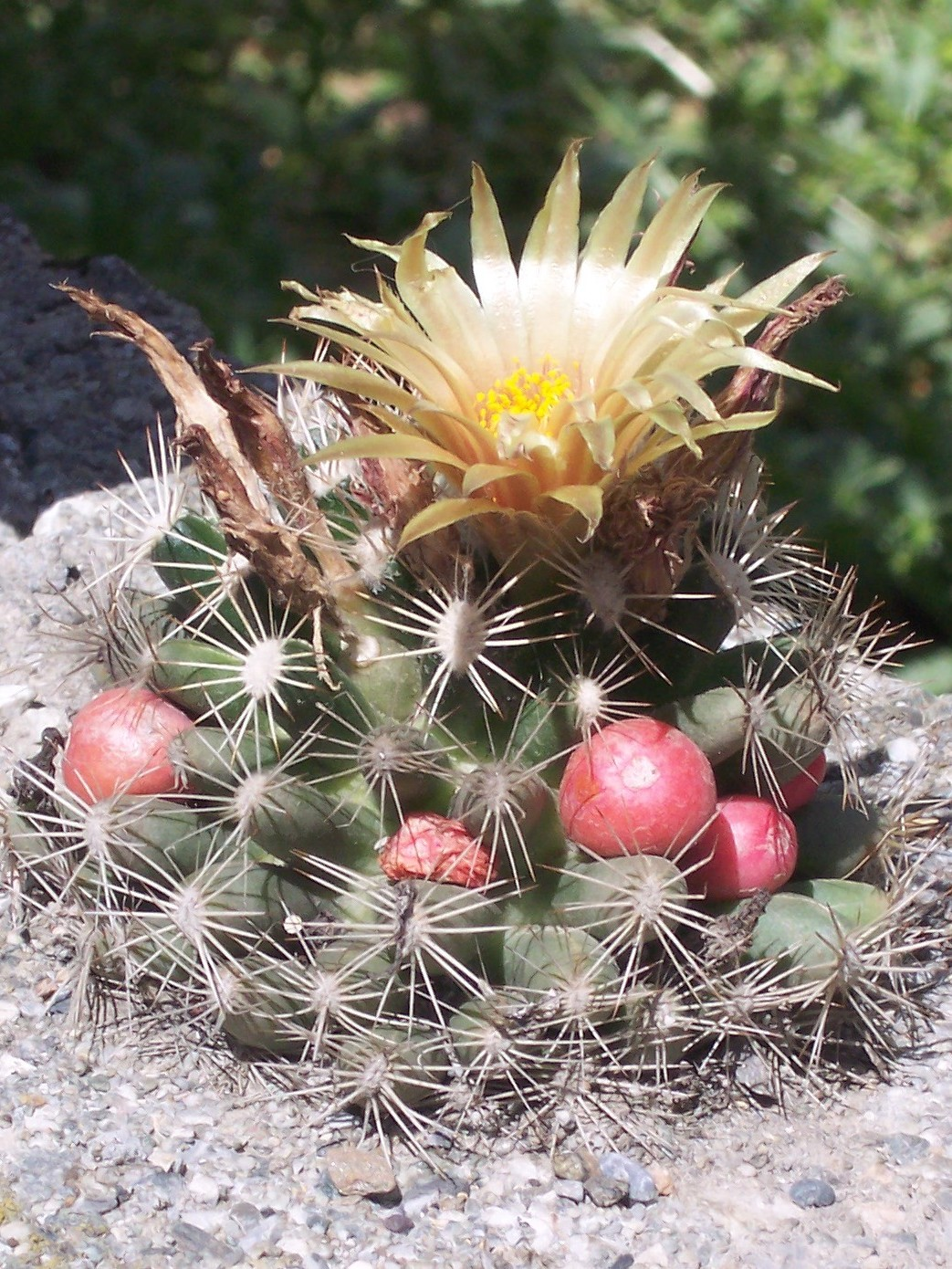 Escobaria (Neobesseya) missouriensis avec fleur, fruits en formation et fruits mûrs. Plante cultivée en plein air à Briançon ( 1200m - Hautes Alpes - France ).